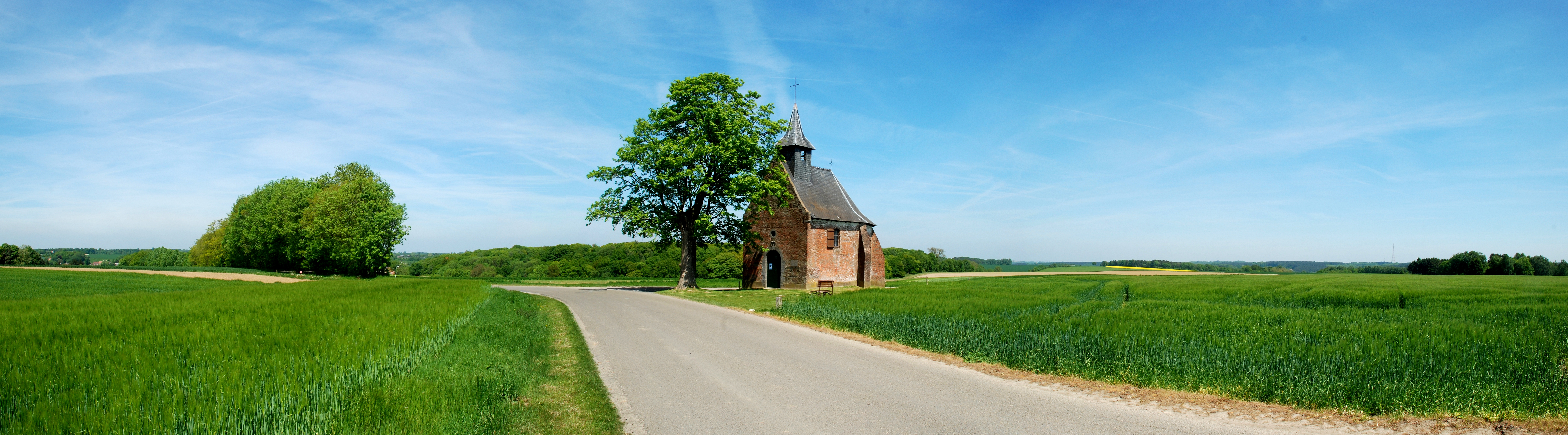 Belgique - Bousval - Chapelle du Try-au-Chêne